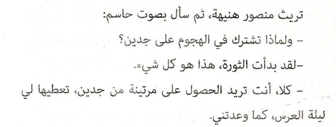 مكان ورود ذكر جدين في كتاب عن الرجال والبنادق لغسان كنفاني